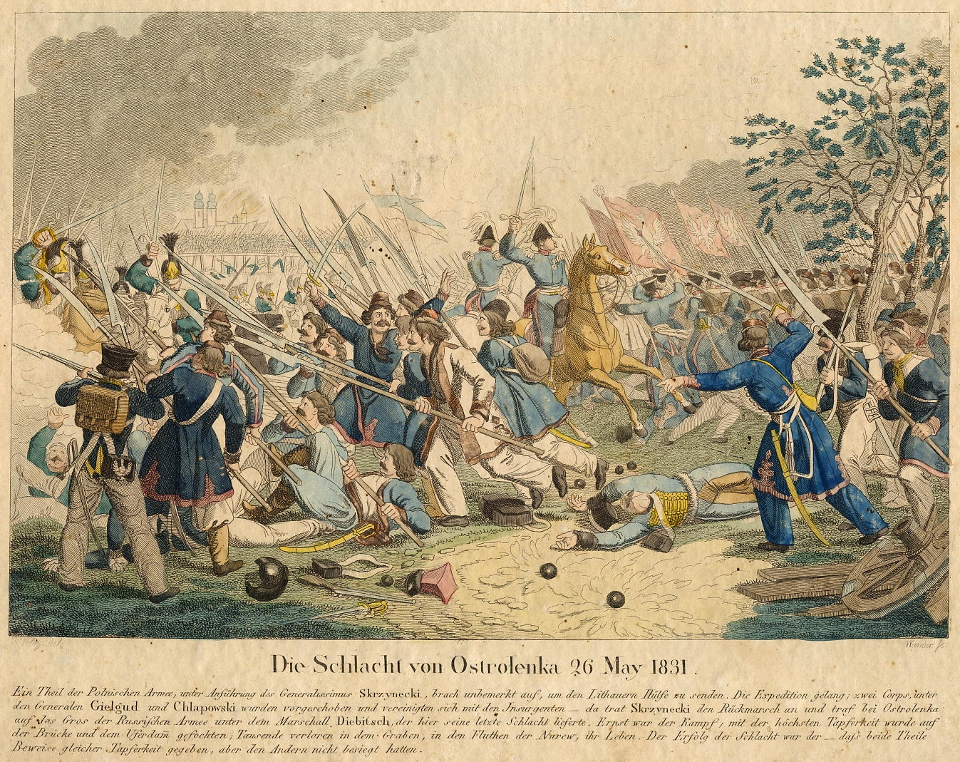 Scene uit de veldslag bij Ostrolenka in 1831.